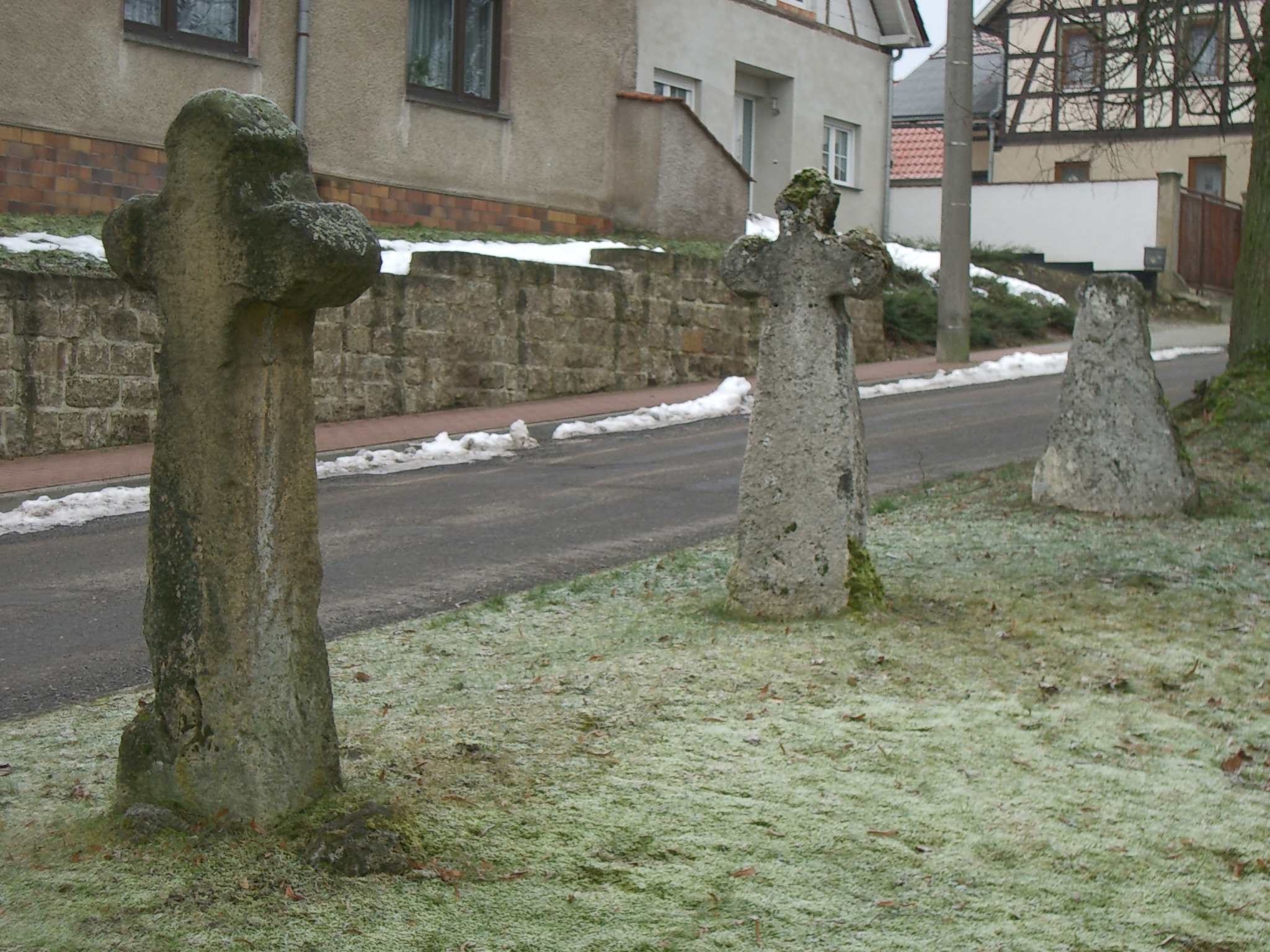 Steinkreuze in Küllstedt